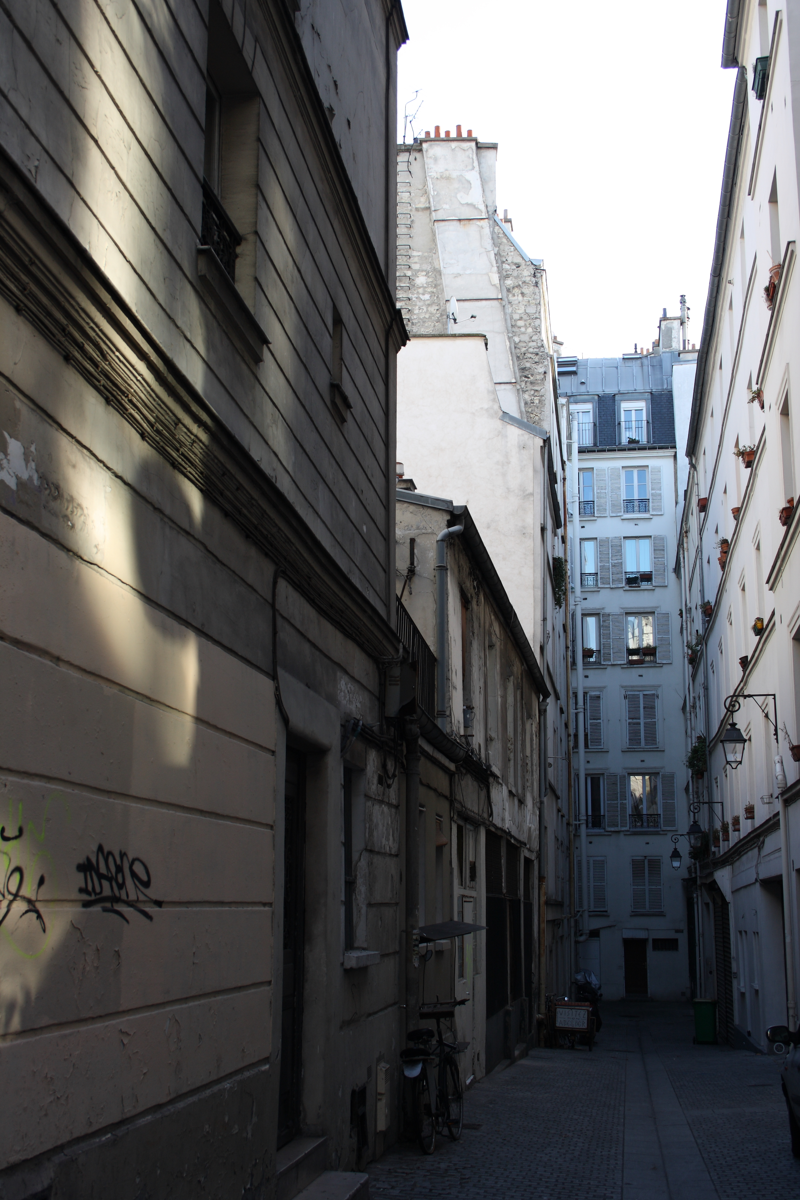 Cité Saint-Martin in Paris (10. Arrondissement)